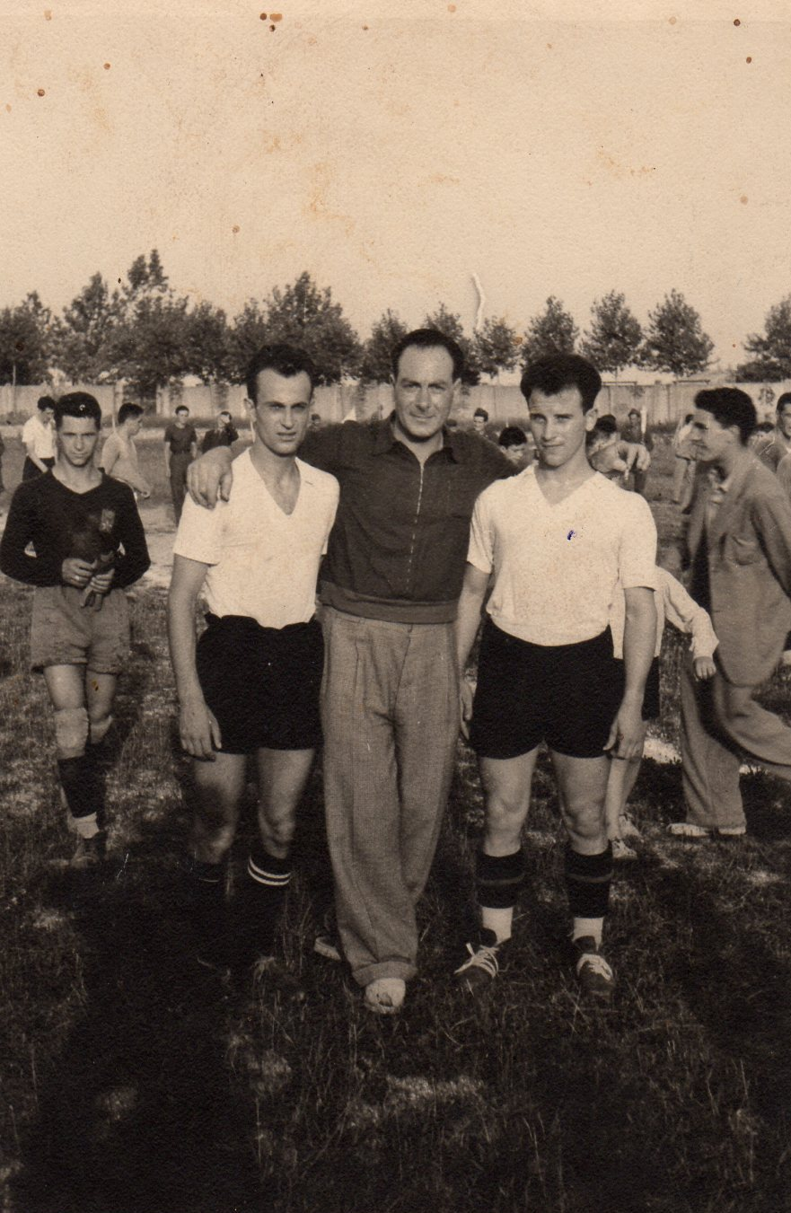 Degano agli esordi con l'Udinese nel 1937